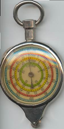 Eigen curvimeter op de scanner gelegd